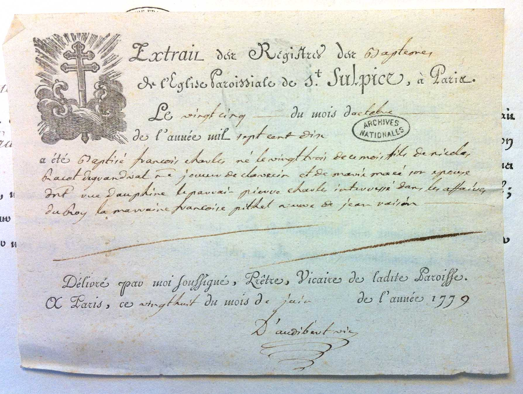 Extrait d'acte de baptême de François Charles Racot de Grandval